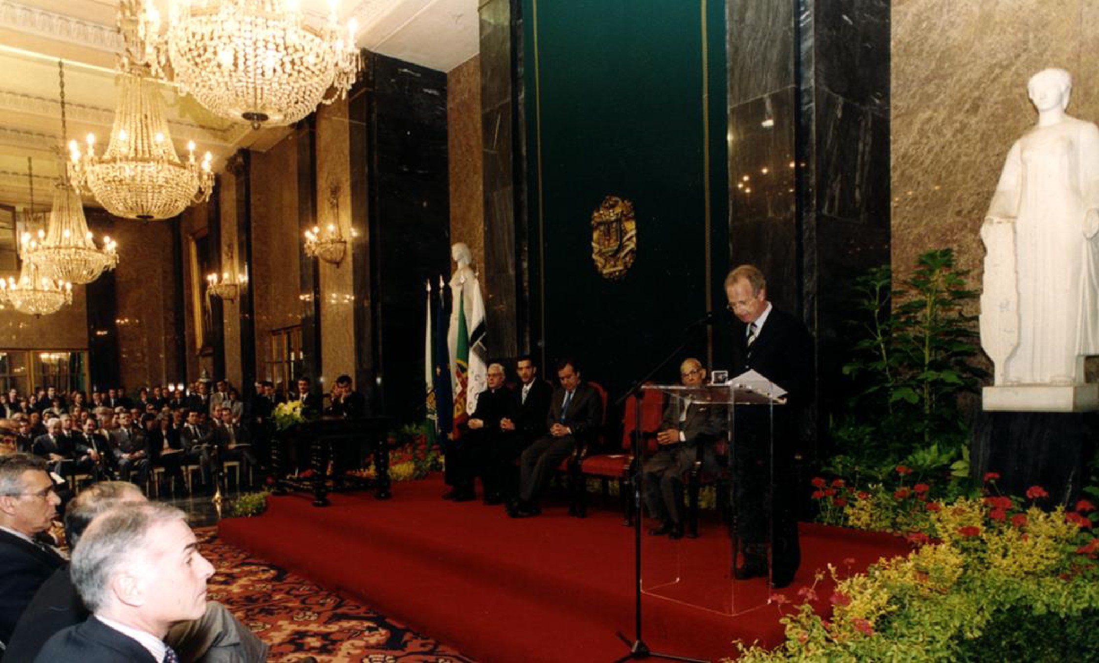 Fotografia tirada a 24 de Maio de 2000, na Câmara Municipal do Porto, por uma câmara pertencente à Fundação Ilídio Pinho, na cerimónia de escritura pública da Fundação.